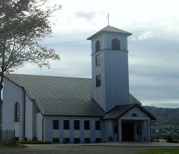 PARAFIA ŚWINNA PORĘBA